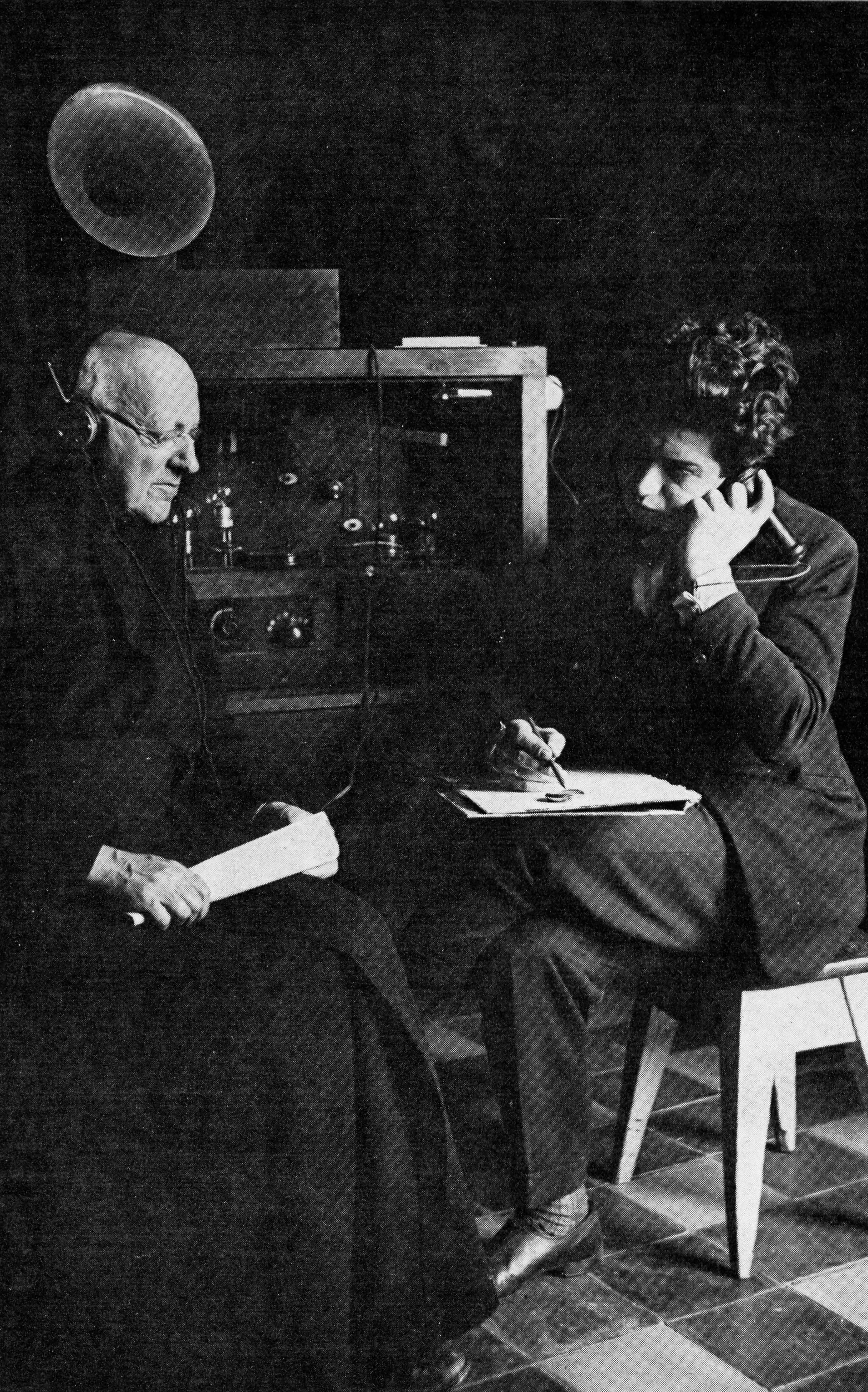 Primo apparecchio radio impiantato al collegio dei barnabiti in Firenze, con Camillo Melzi D'Eril (a sinistra) e Ernesto Parodi (a destra).